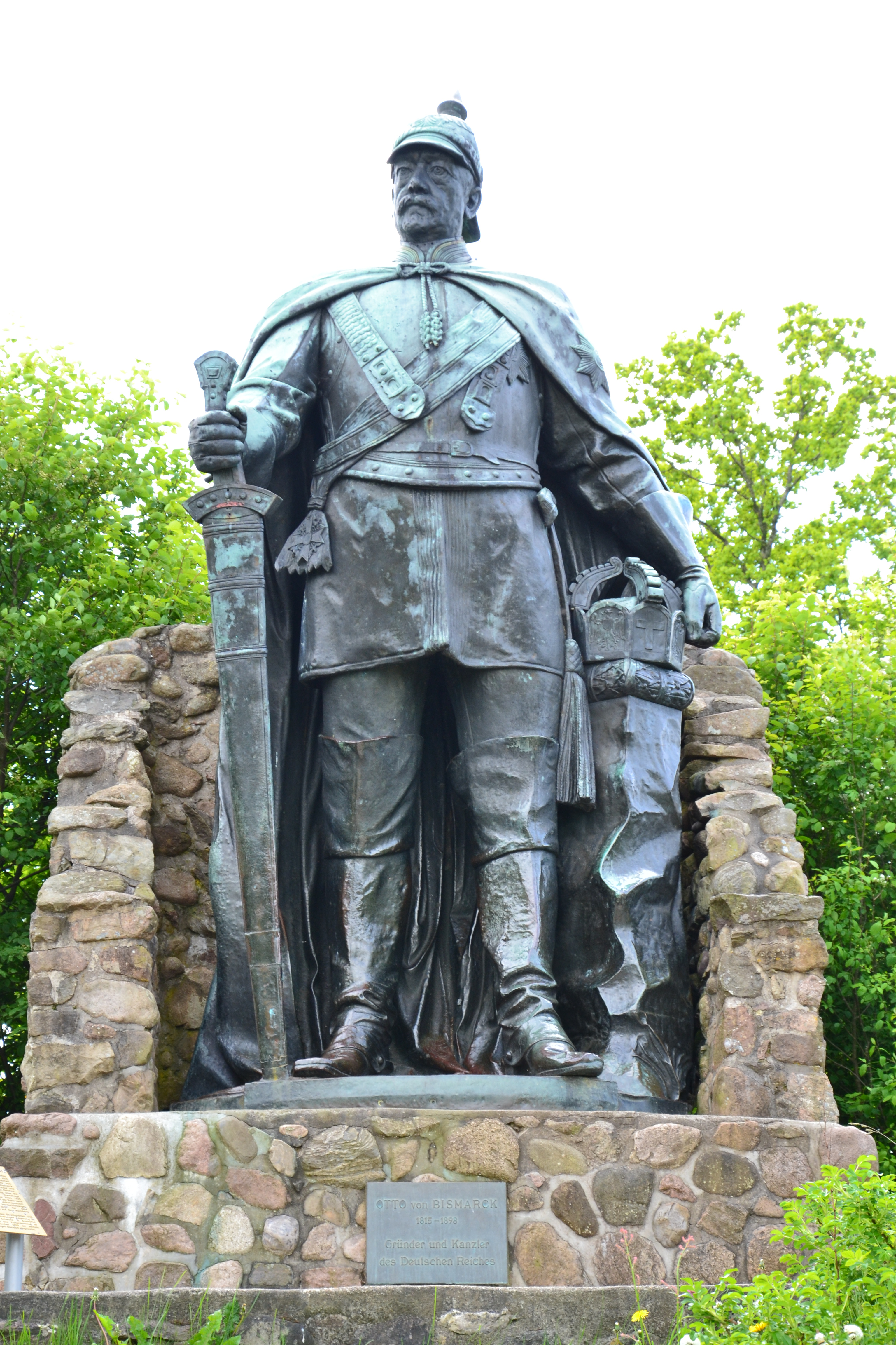 Bismarck-Denkmal auf dem Aschberg in Schleswig-Holstein, Vorderansicht